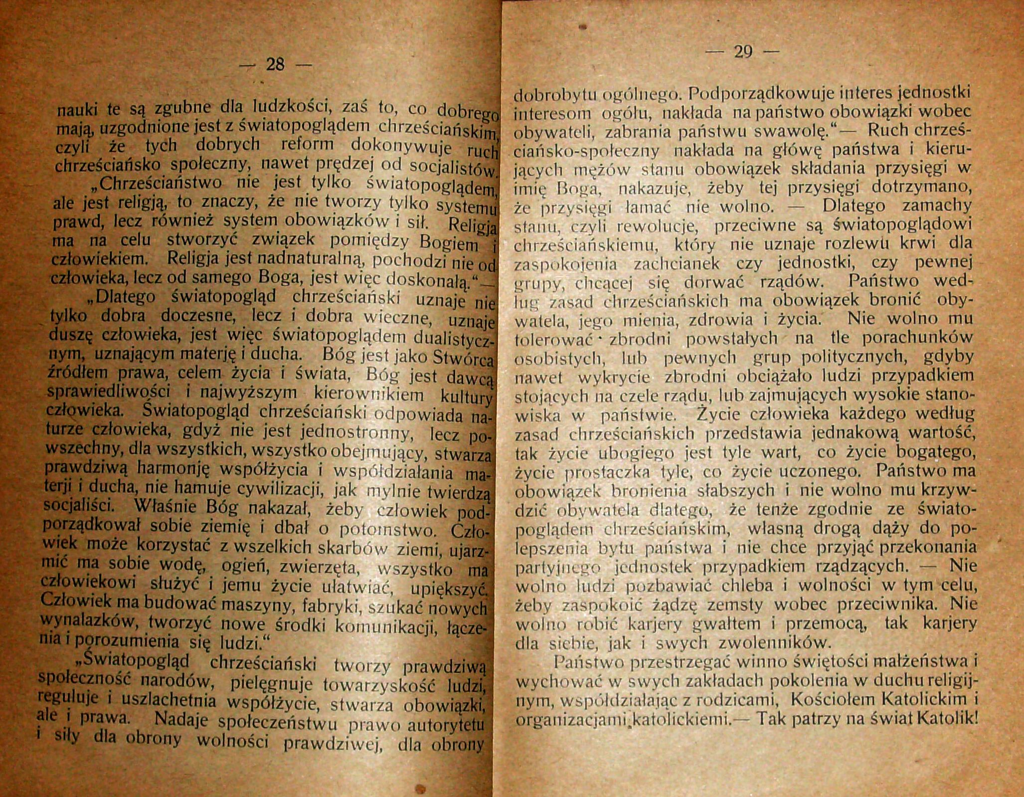 Stanisław Krzyżowski, Rozmyślania w czterdziestą rocznicę encykliki „Rerum novarum”, wydanej 15 maja 1891 r. przez papieża Leona XIII, Pszczyna 1931